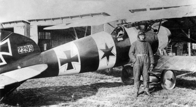 Bruno Loerzer di fronte al suo Albatros D.V 2299 con la caratteristica livrea dello JG26